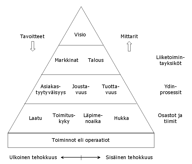 Suorituskykypyramidi